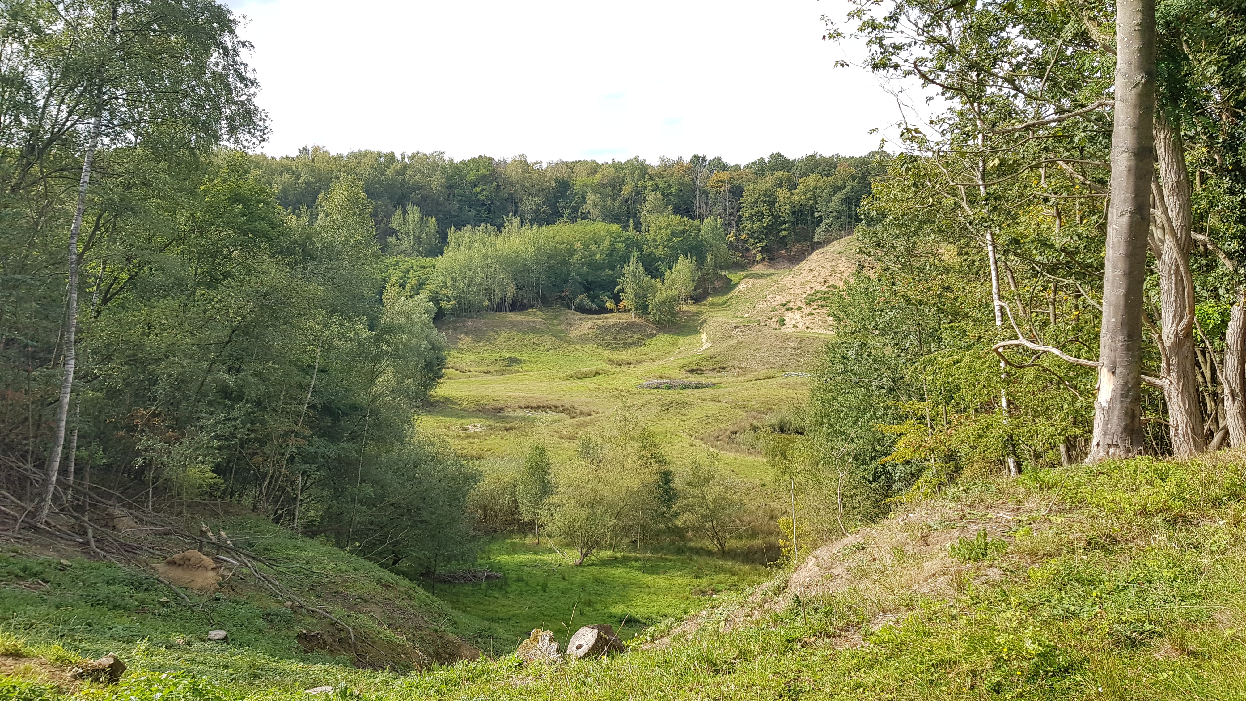 Meertensgroeve, Vilt, Limburg, Nederland